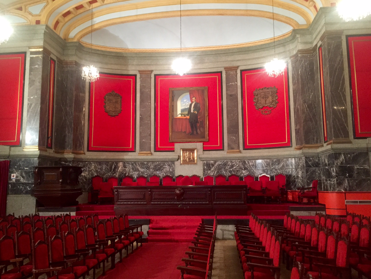 Aula Magna de la Universidad de Los Andes, Mérida, Venezuela.